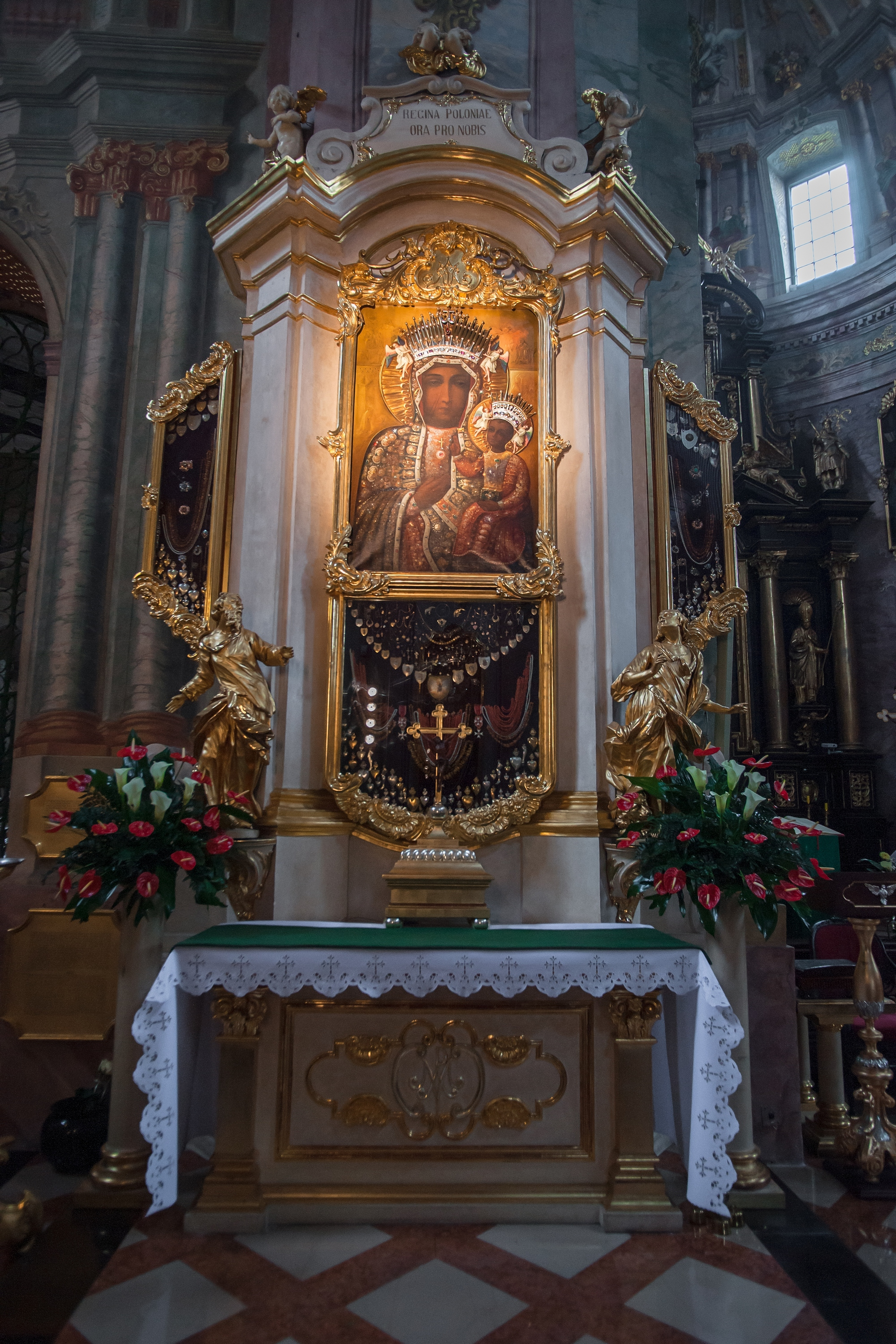 Lublin, kościół p.w. św. Jana, ob. katedra, XVI/XVII, XVIII/XIX